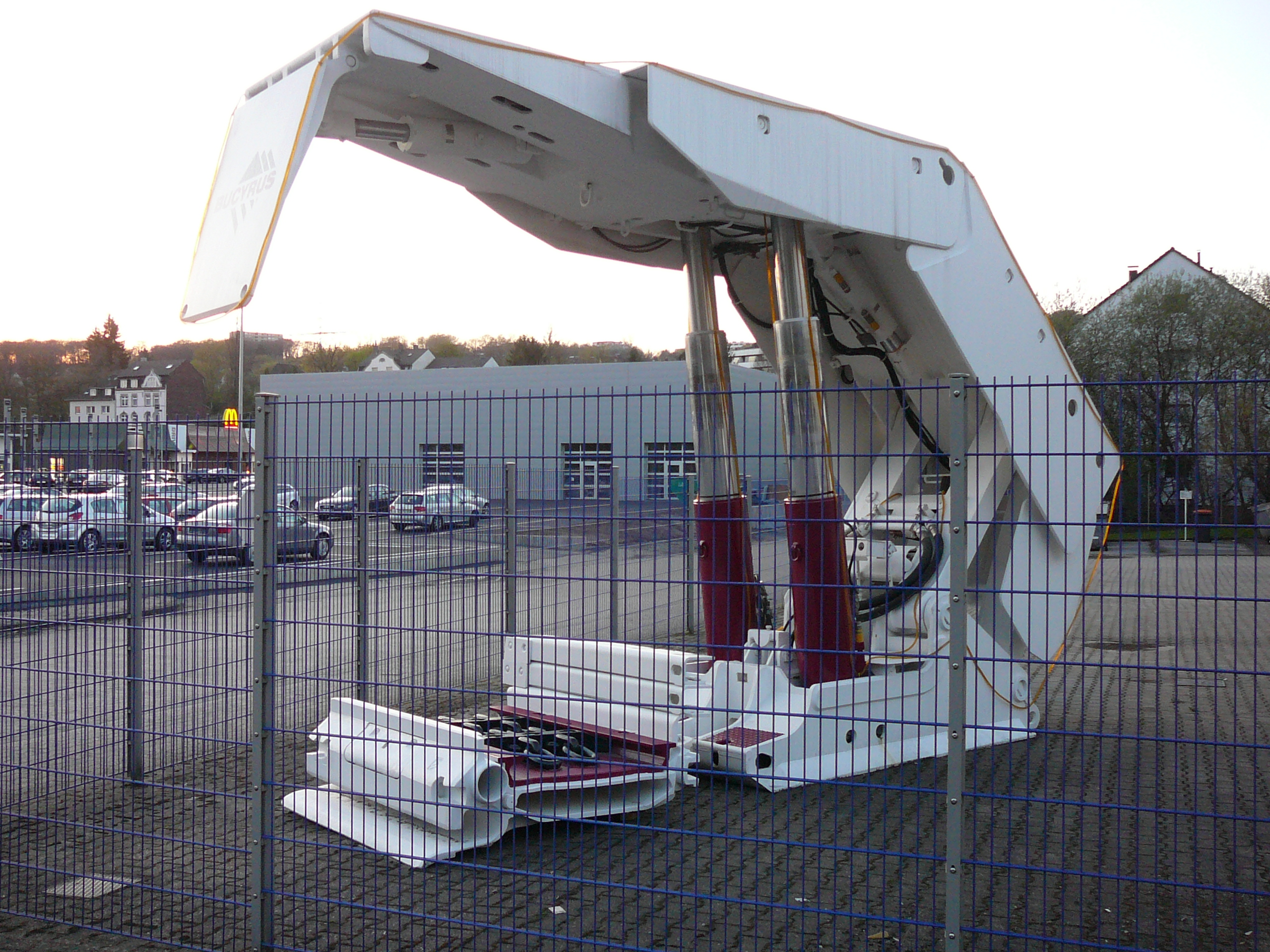 Bornberg, Wuppertal